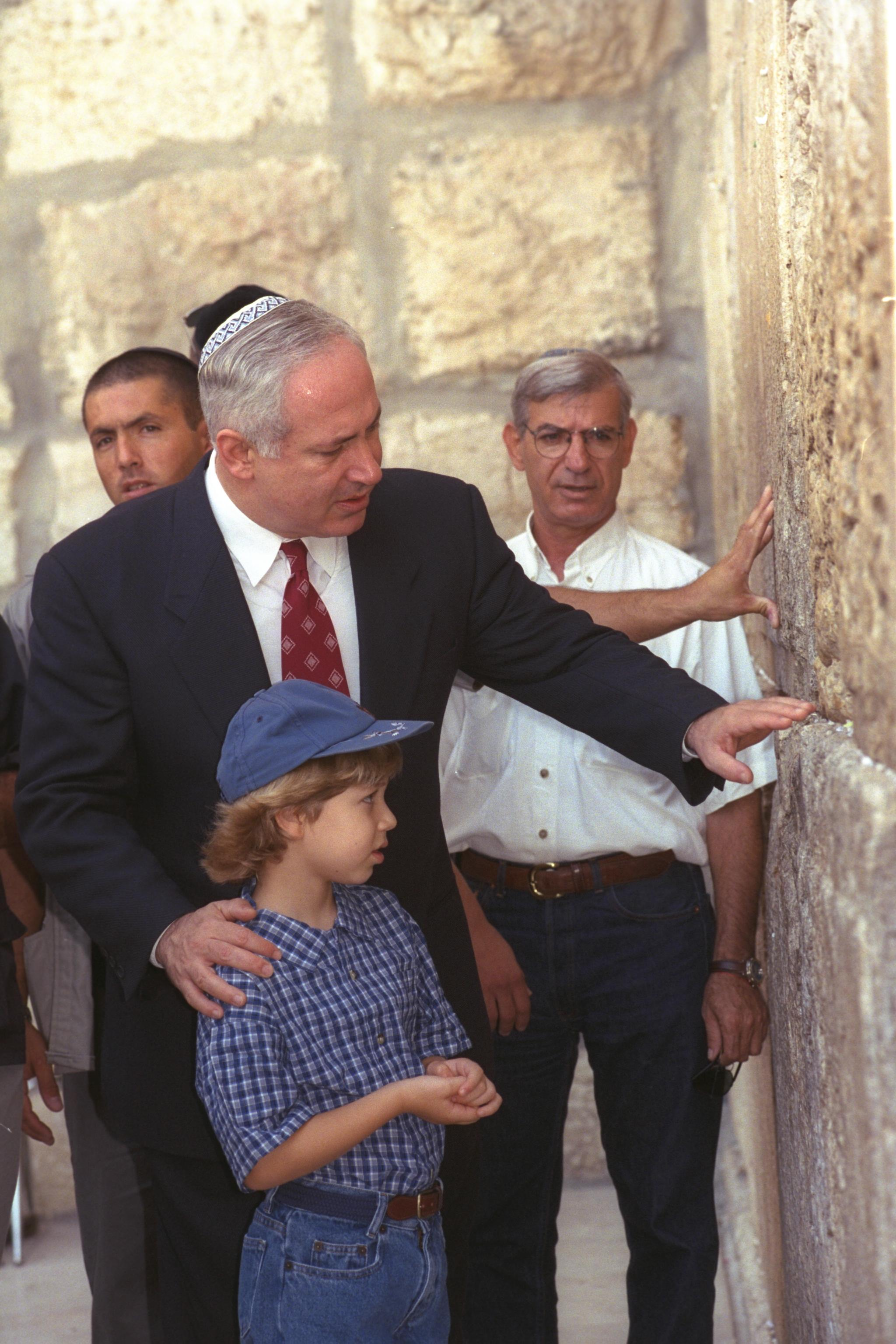 Prime Minister Benjamin Netanyahu and his son Yair visit the Western Wall in Jerusalem during the eve of Rosh Hashanah. ראש הממשלה בנימין נתניהו ובנו יאיר מכניסים פתק בין אבני הכותל המערבי, בערב חג ראש השנה. Photo by Ohayon Avi, GPO.